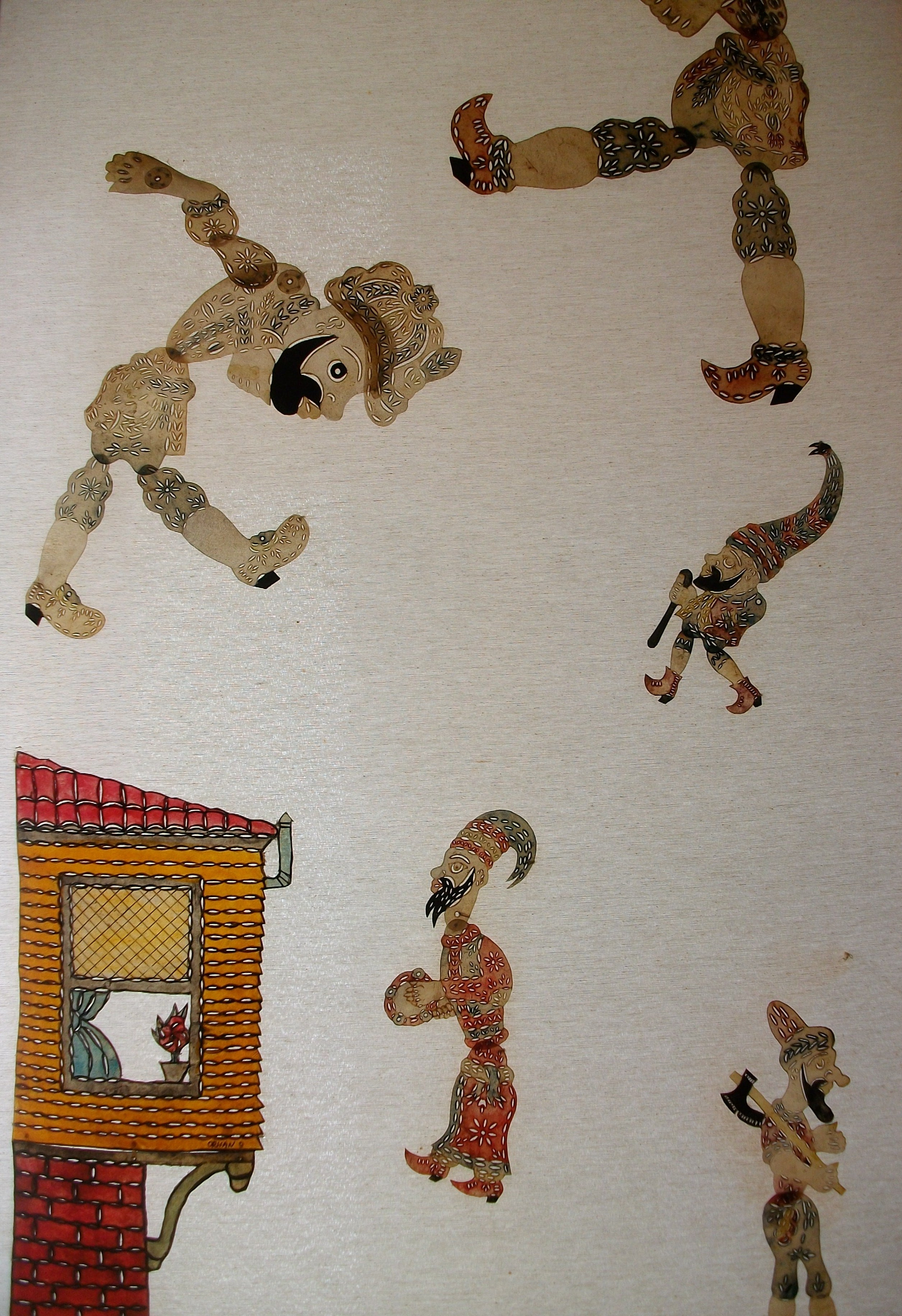 Karagoz, teatre d'ombres turc, Museu Internacional de Titelles d'Albaida.